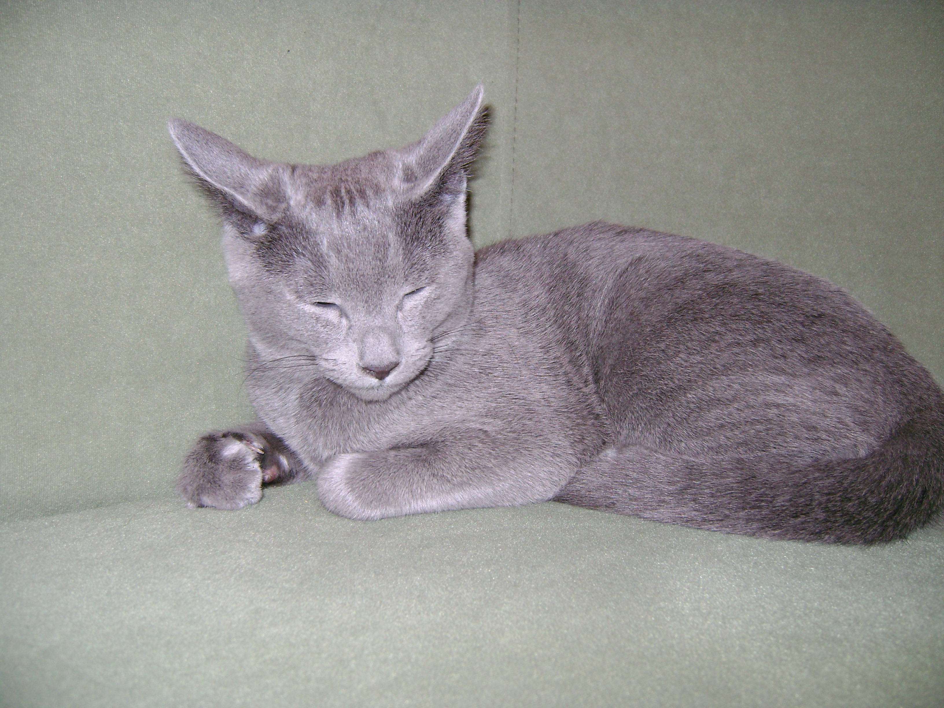 Kotka - rasa: Rosyjski niebieski; Wiek. ok. 6 m-cy